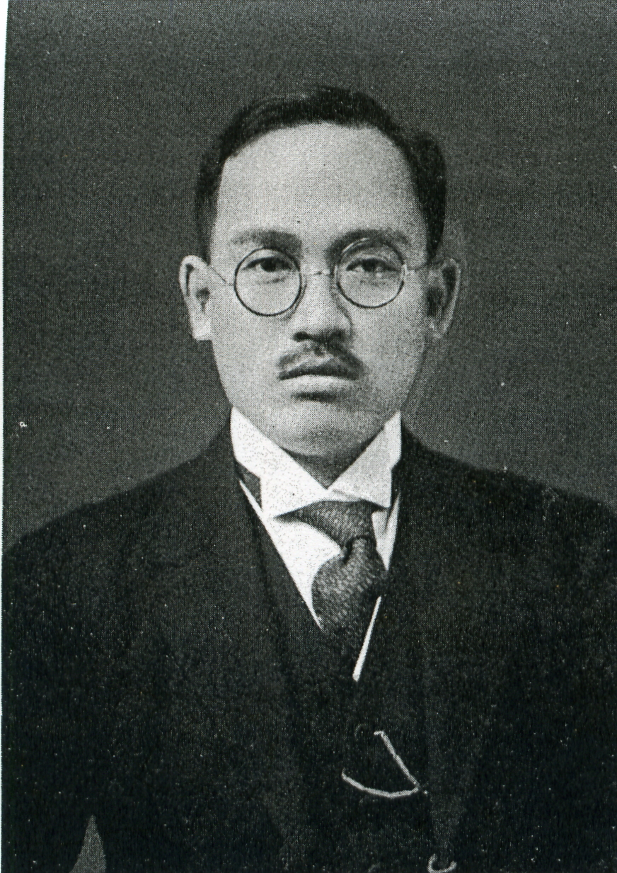 この写真は、原惣兵衛（1891-1950）の写真です。